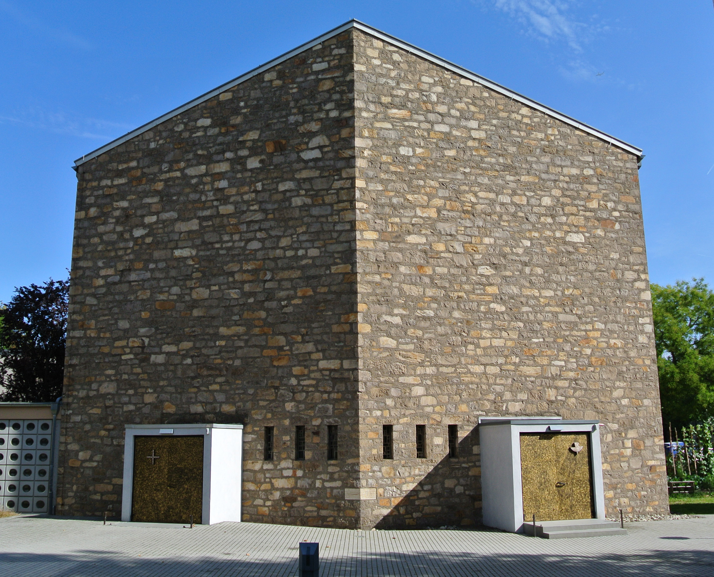 Wartburgkirche in Frankfurt-Nordend, Architekt: Walter W. Neumann, Baujahr 1962, Westfassade